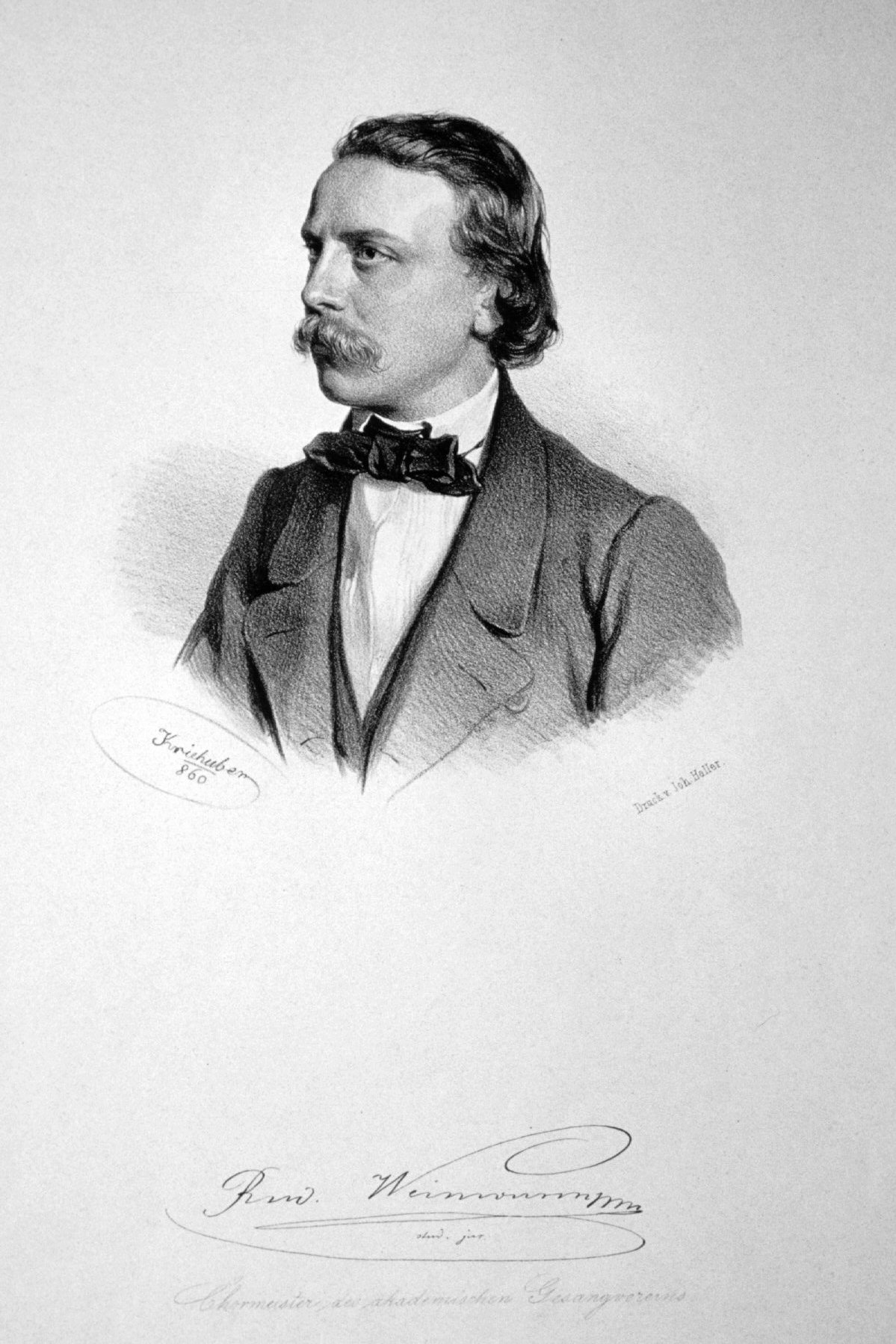 Rudolf Weinwurm (1835-1911), Chormeister, Komponist, Jurist Lithographie von Josef Kriehuber , 1860